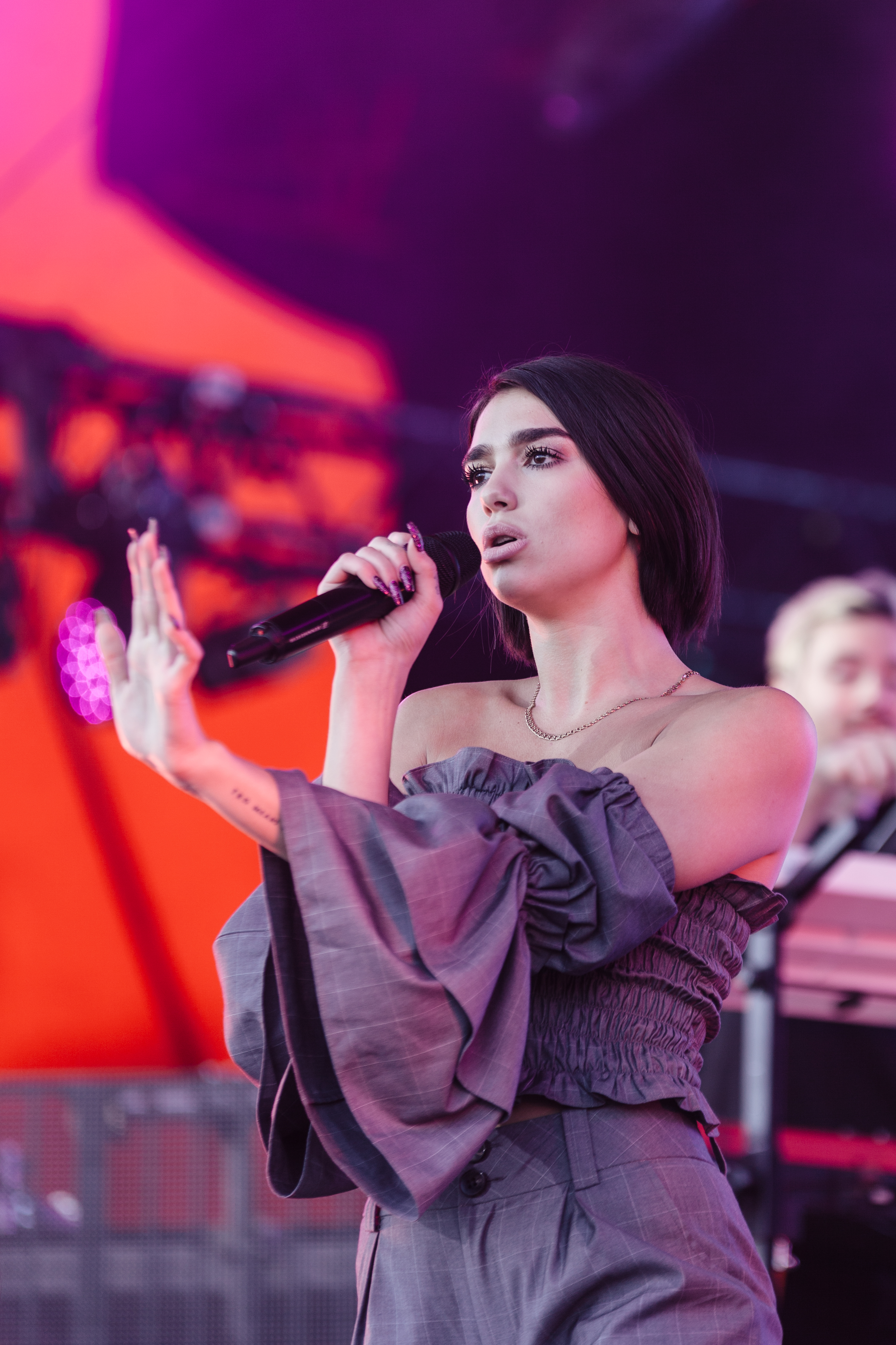 Festivalsommer This photo was created with the support of donations to Wikimedia Deutschland in the context of the CPB project "Festival Summer".